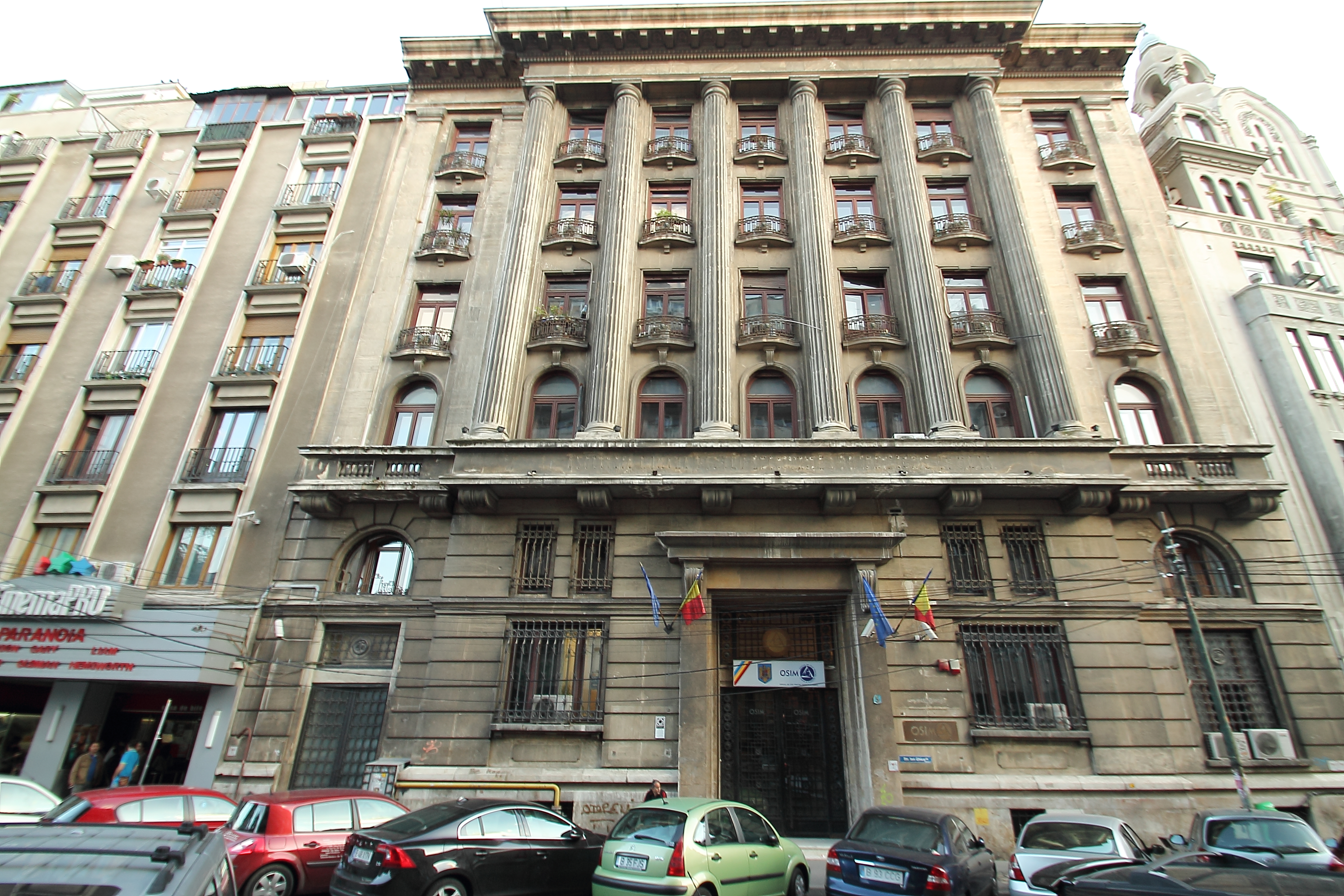 Cladire Monument istoric str Ioan Ghica